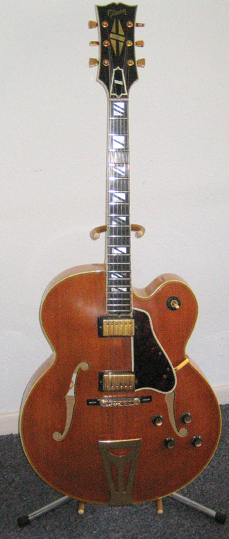 Gibson Super 400 CES Antique Natural Baujahr 1981